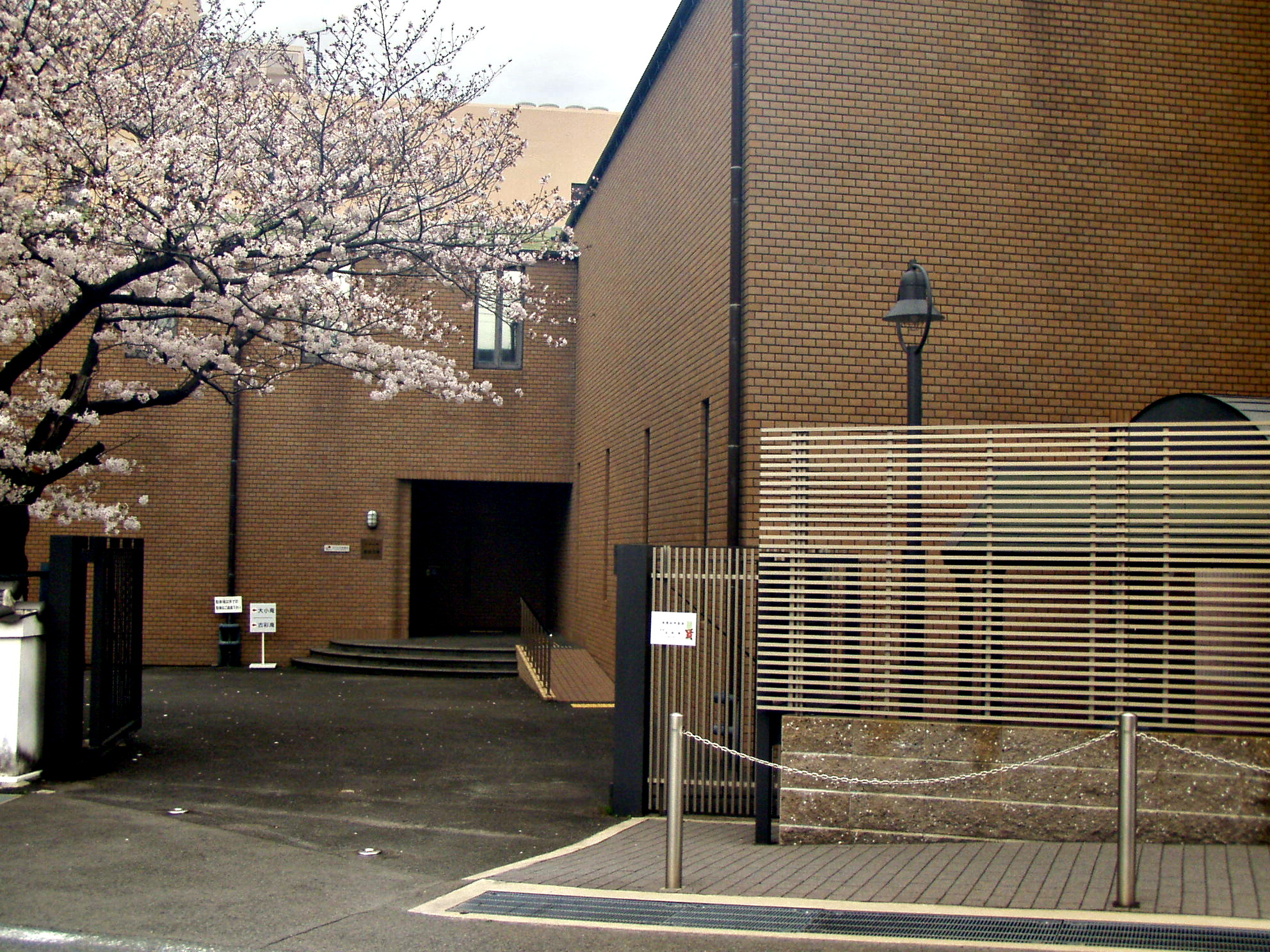 公益財団法人阪急文化財団 池田文庫